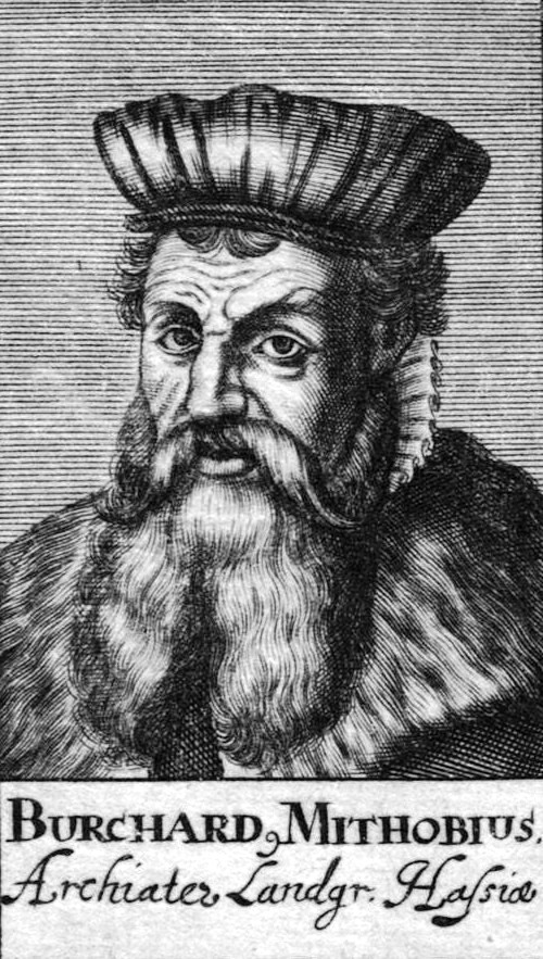 Doctor Burchard Mithoff (Mithobius) (1501–1565), landgräflich hessischer Leibarzt (Archiater); auch herzoglicher in Hann. Münden, dort sein Epitaph in der ev.-luth. Kirche St. Blasius 1567